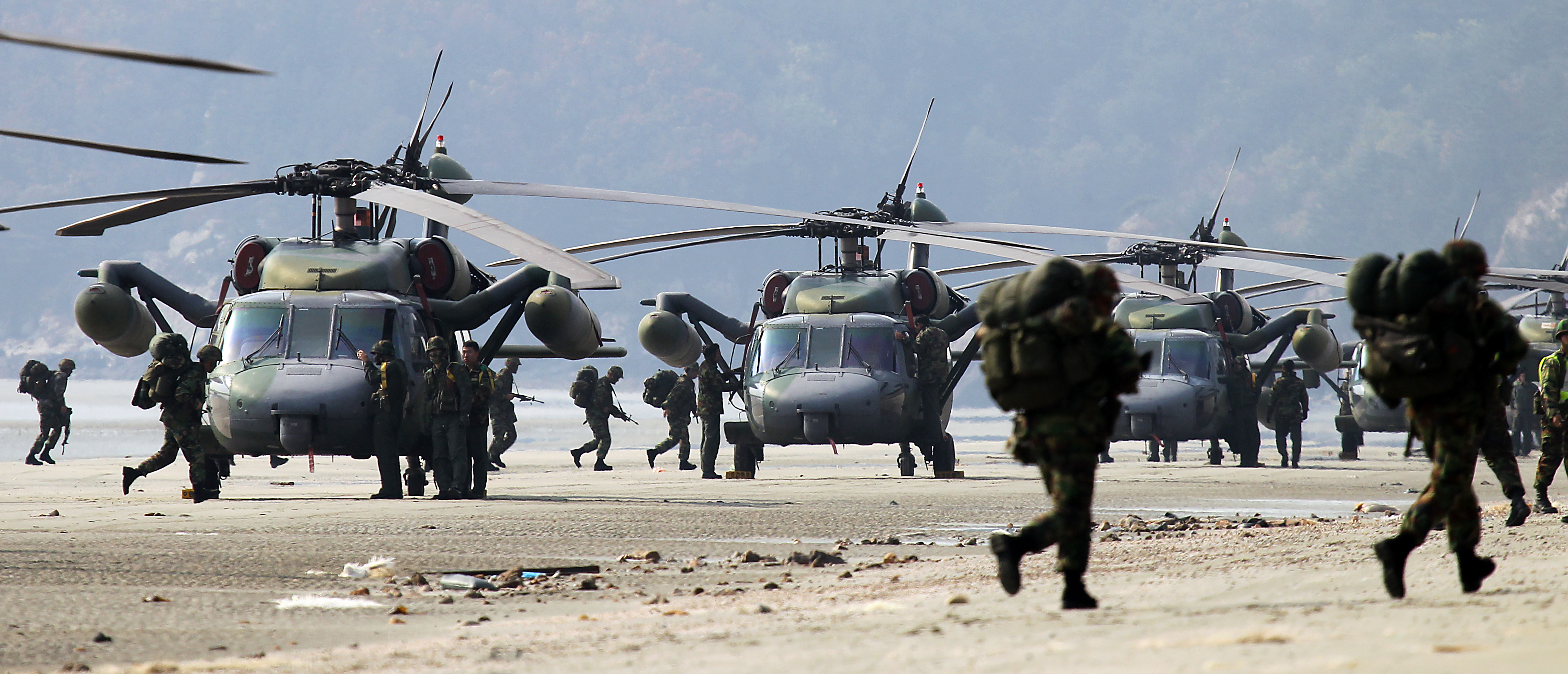 2011년 해병대 훈련사진 모음